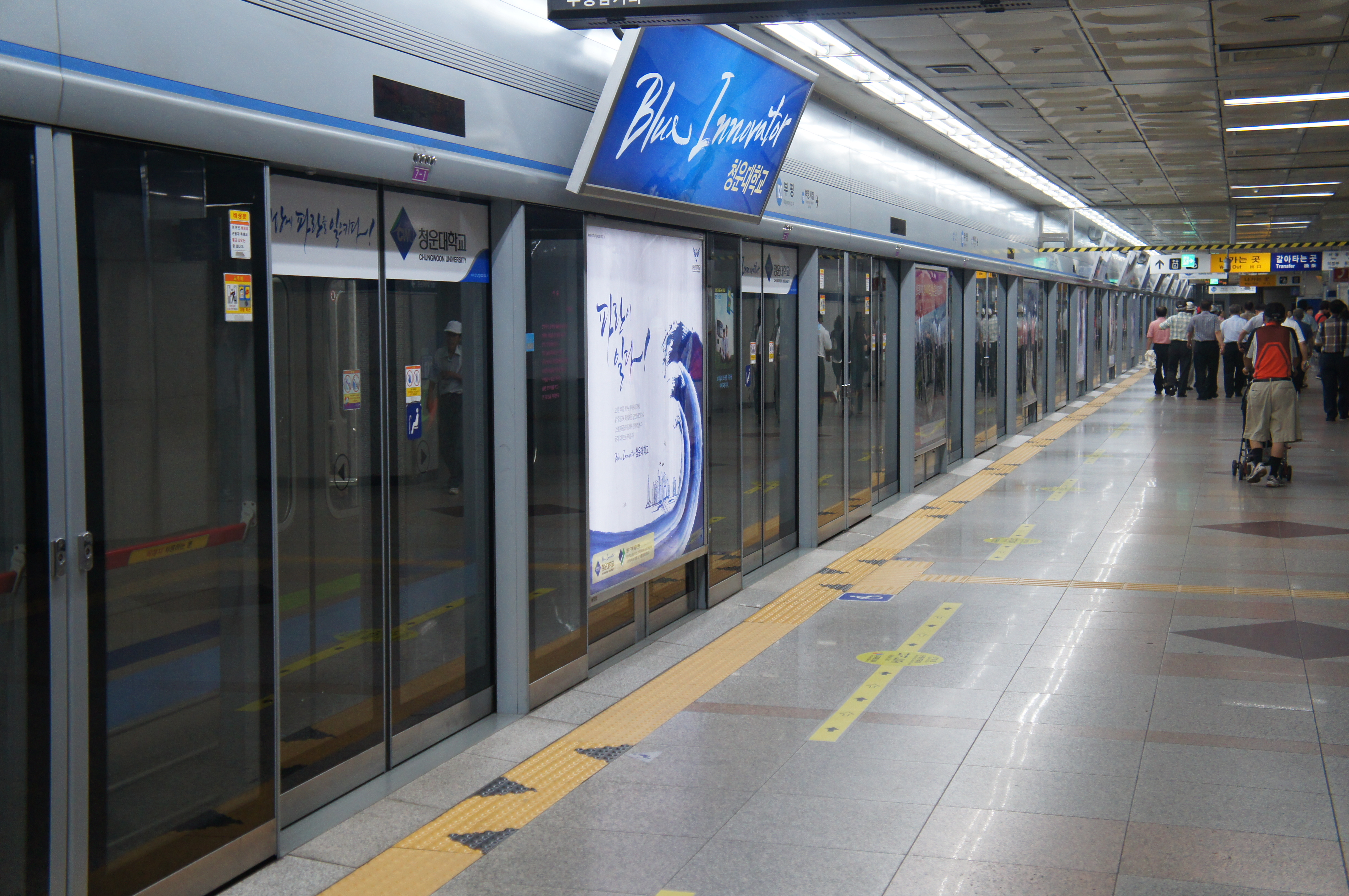 인천1호선 부평역 역명판